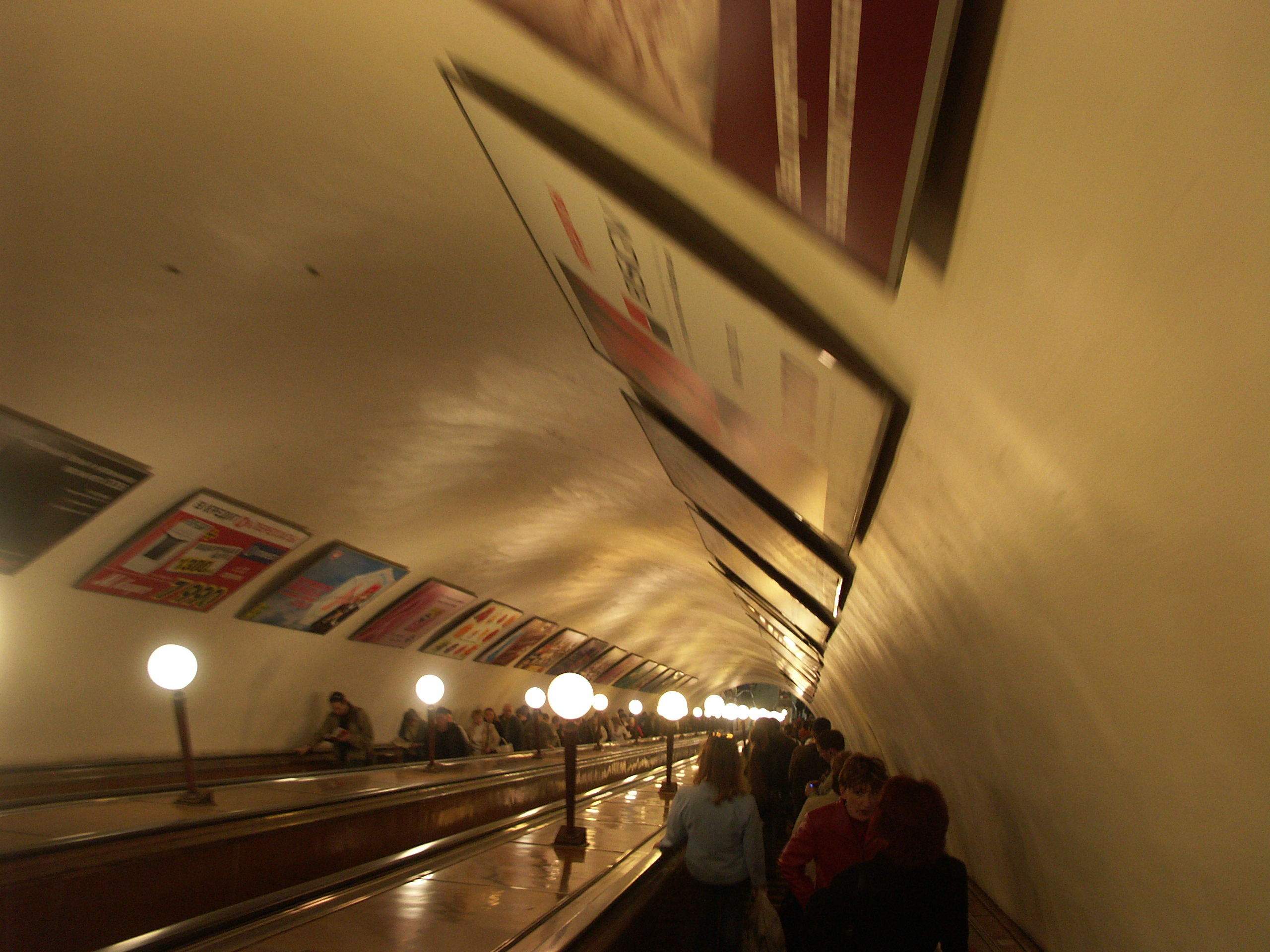 Эскалаторный наклон станции "Парк Культуры" Кольцевой линии Московского метро до реконструкции Автор: User:Glaue2dk Дата: 2006-05-08